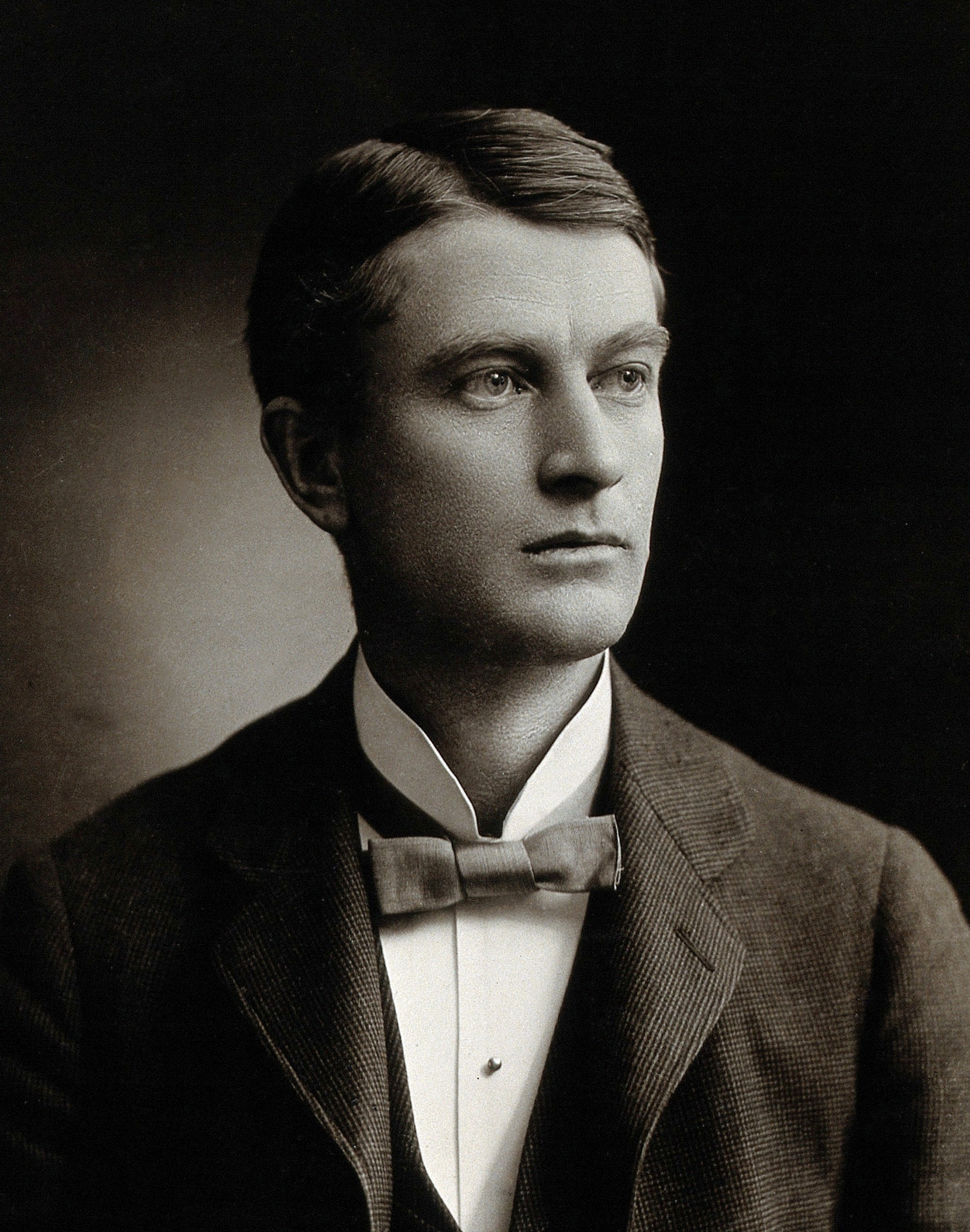 William James Mayo